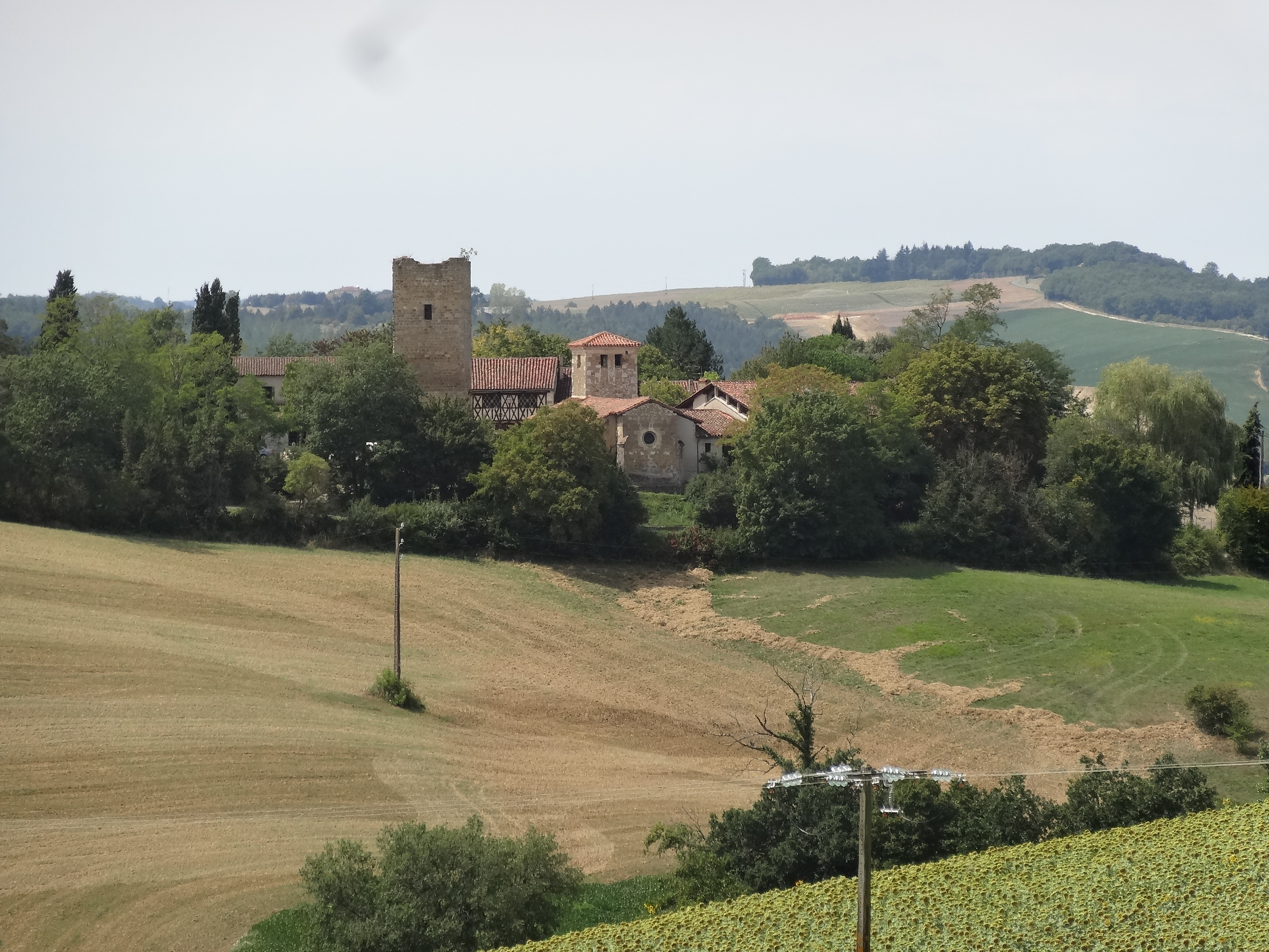 Le hameau circulaire de Mombert.